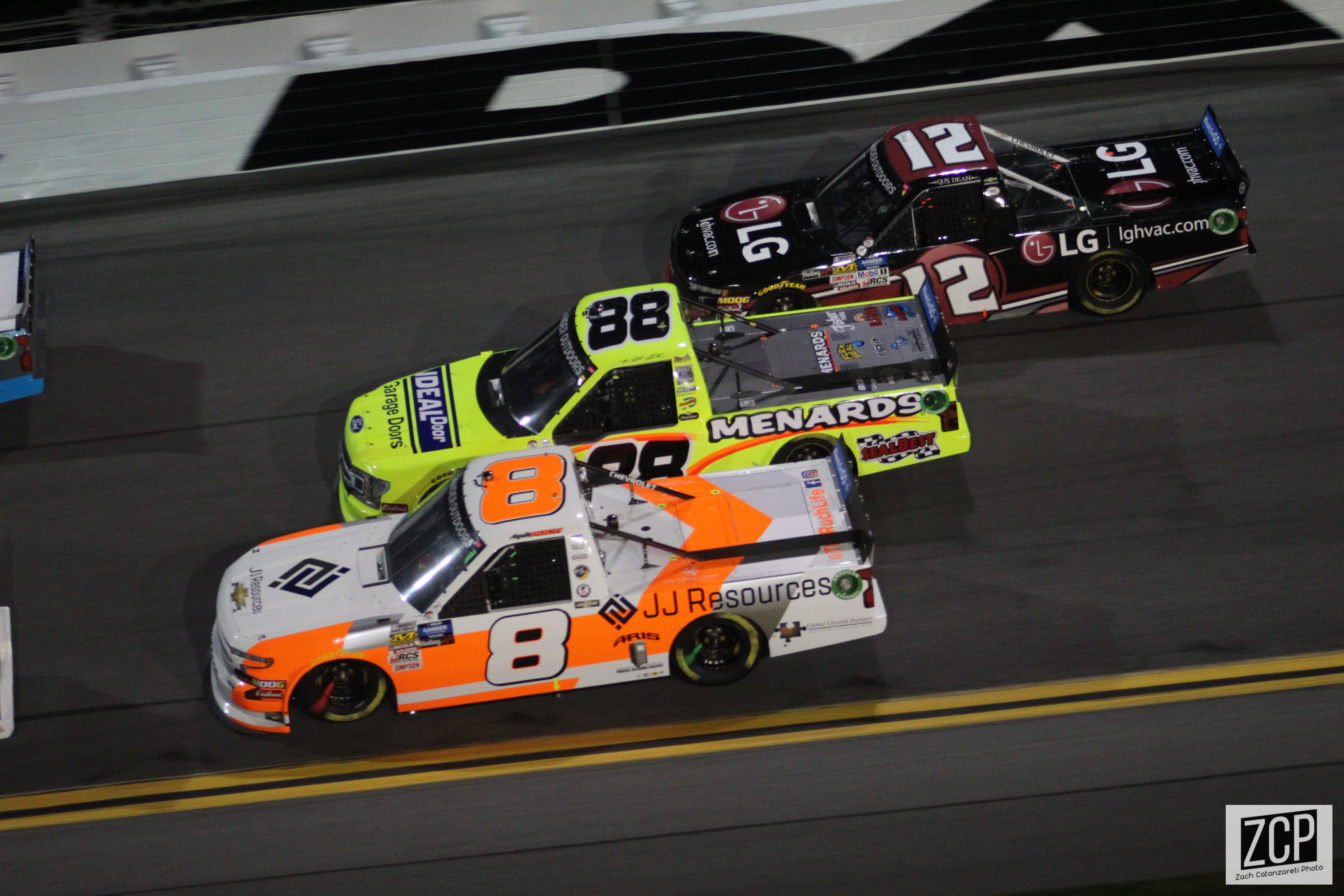 2019 Daytona 500